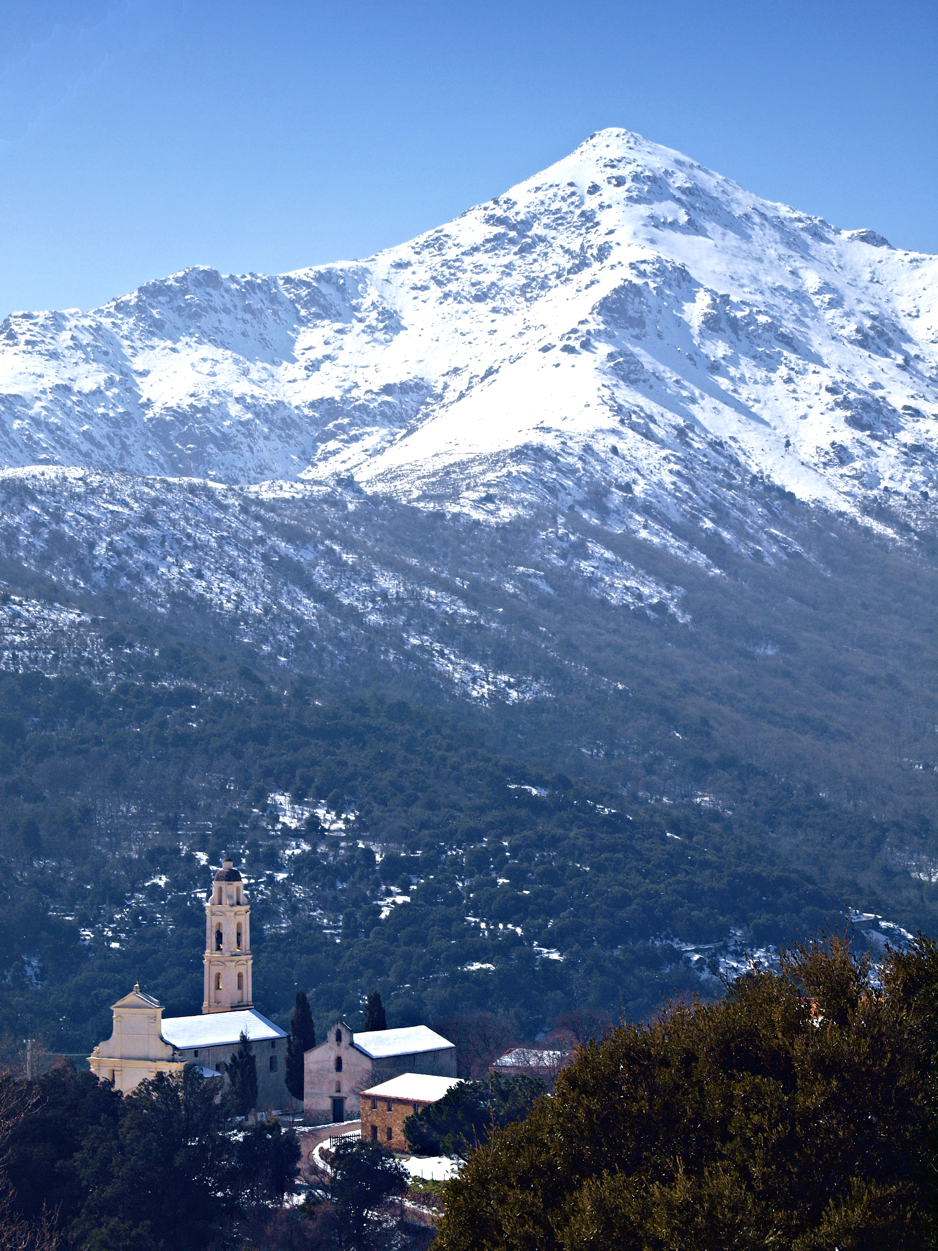 Olmi-Cappella (Corsica) - L'église Saint-Nicolas et le San Parteo